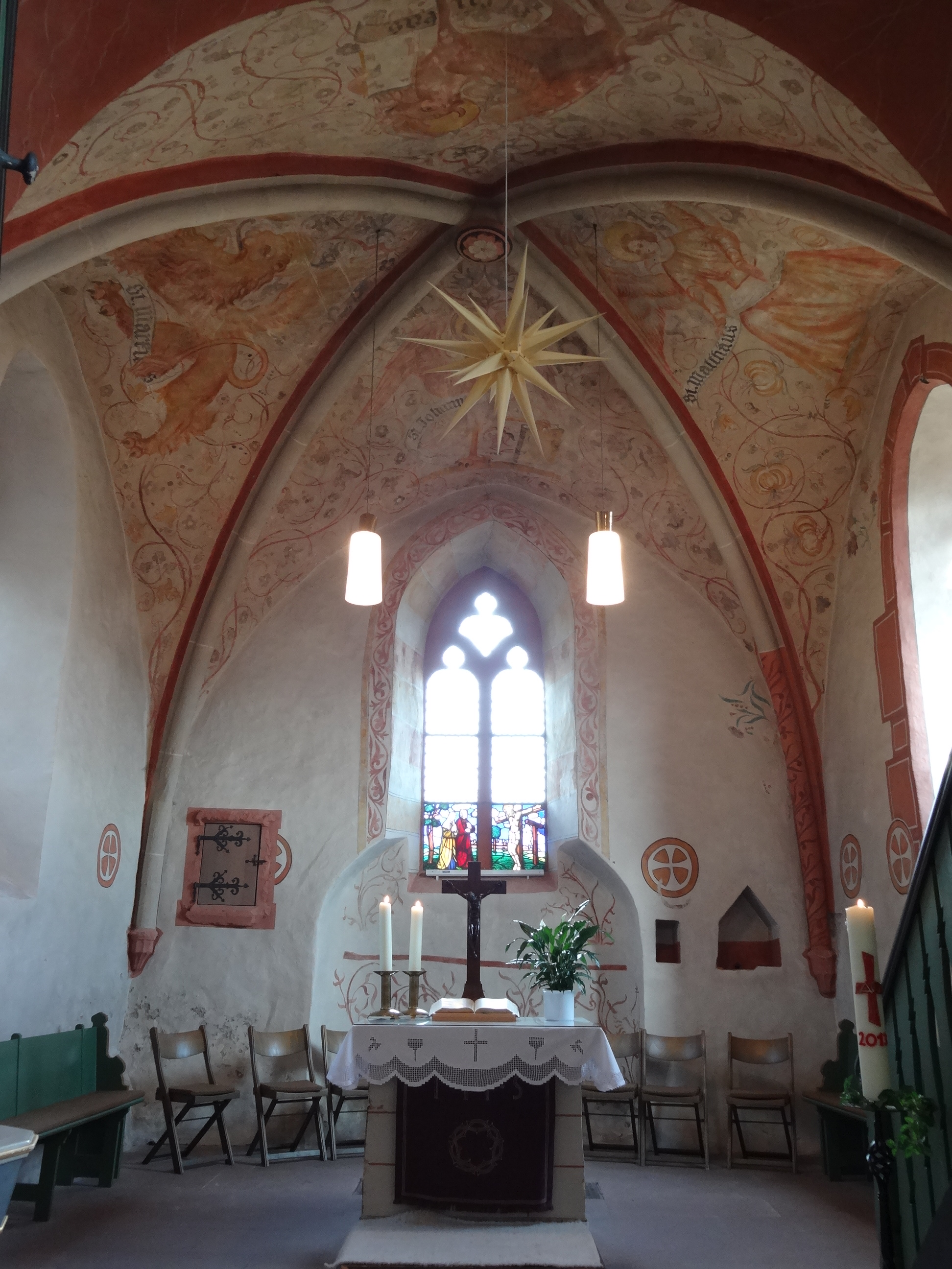 Evangelische Pfarrkirche Ober-Widdersheim